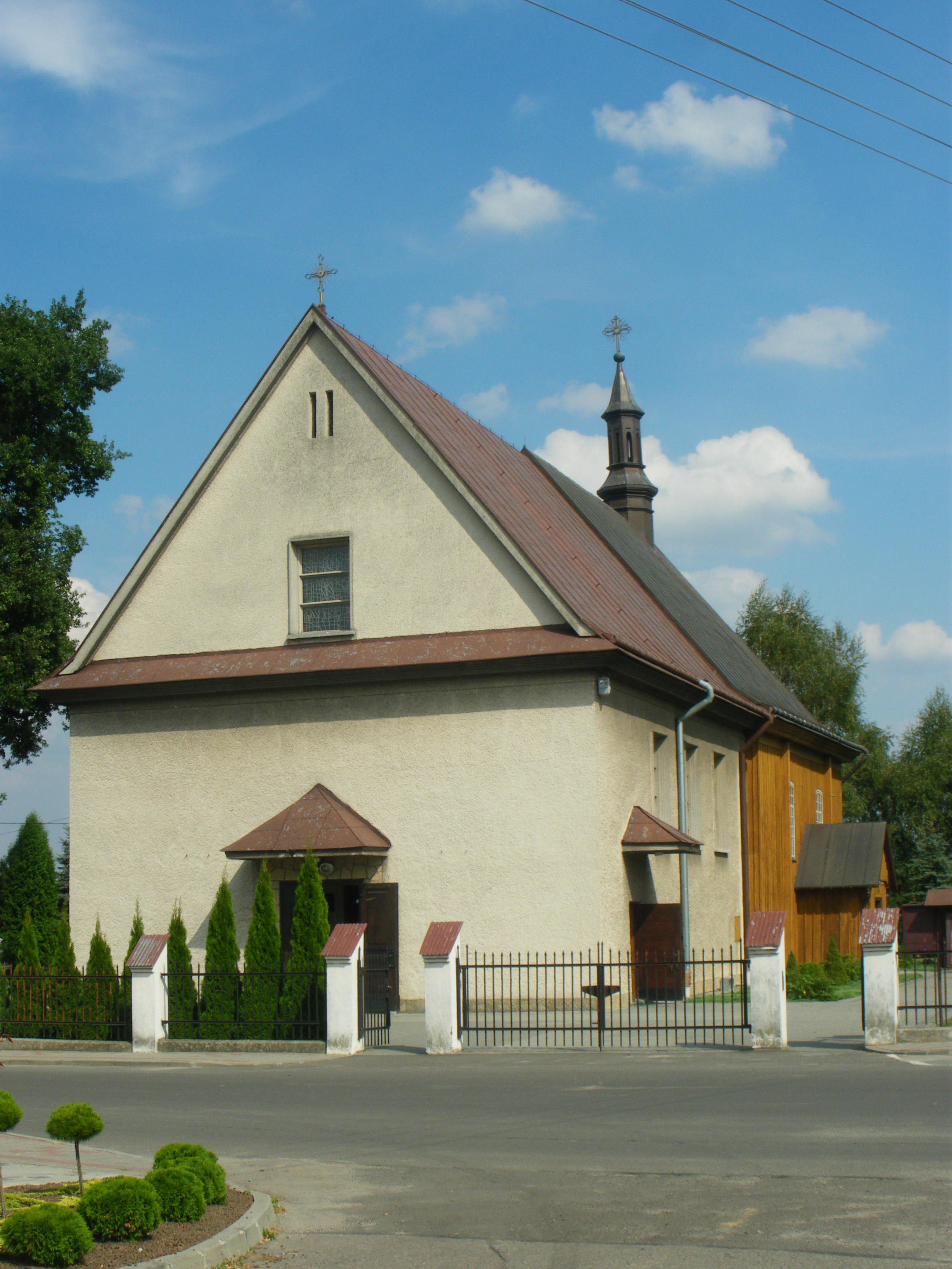 Kościół parafialny p.w. św. Michała Archanioła w Ropczycach Witkowicach